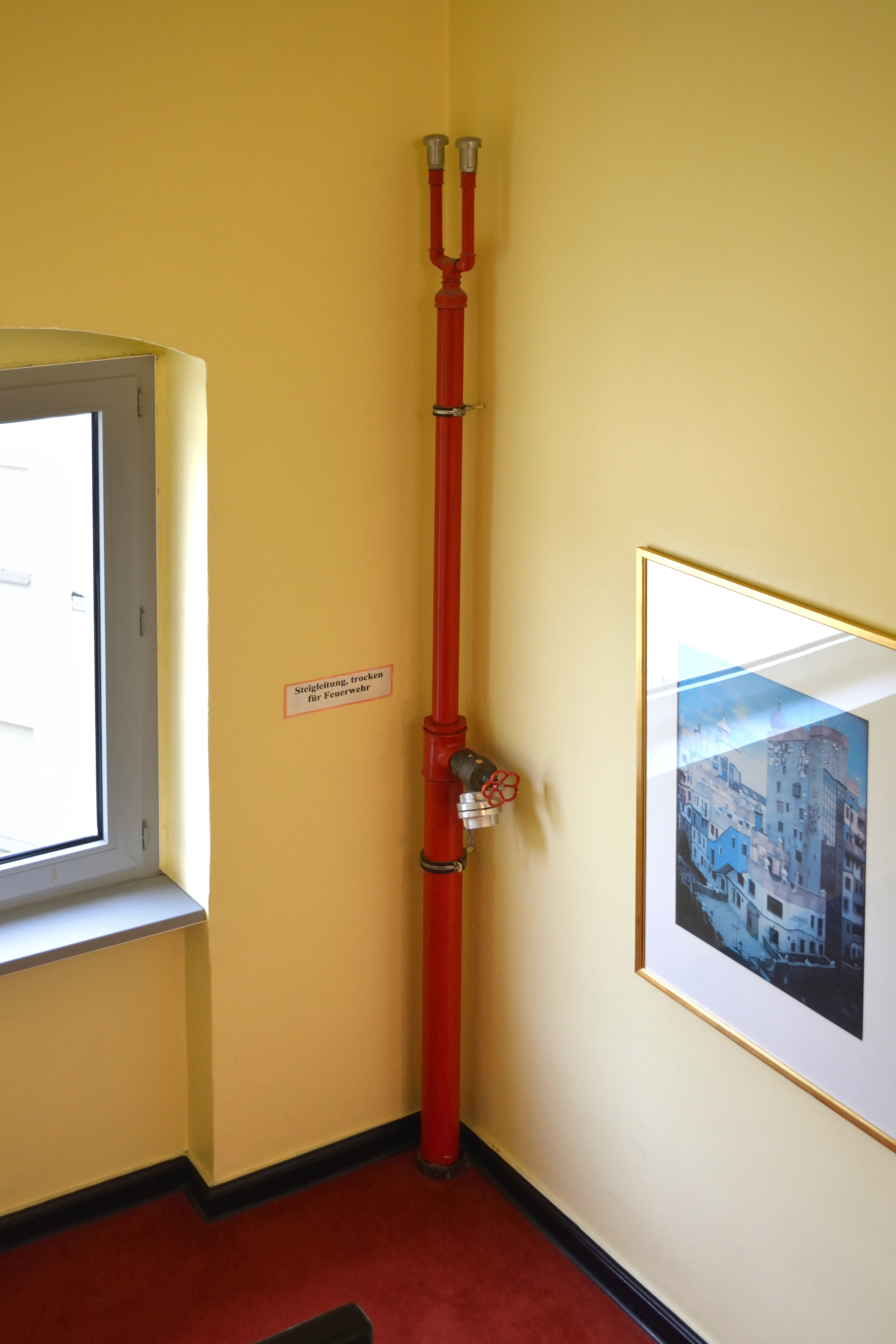 Eine Steigleitung "trocken" wird im Brandfall von der Feuerwehr von aussen am Gebäude mit Wasser versorgt.